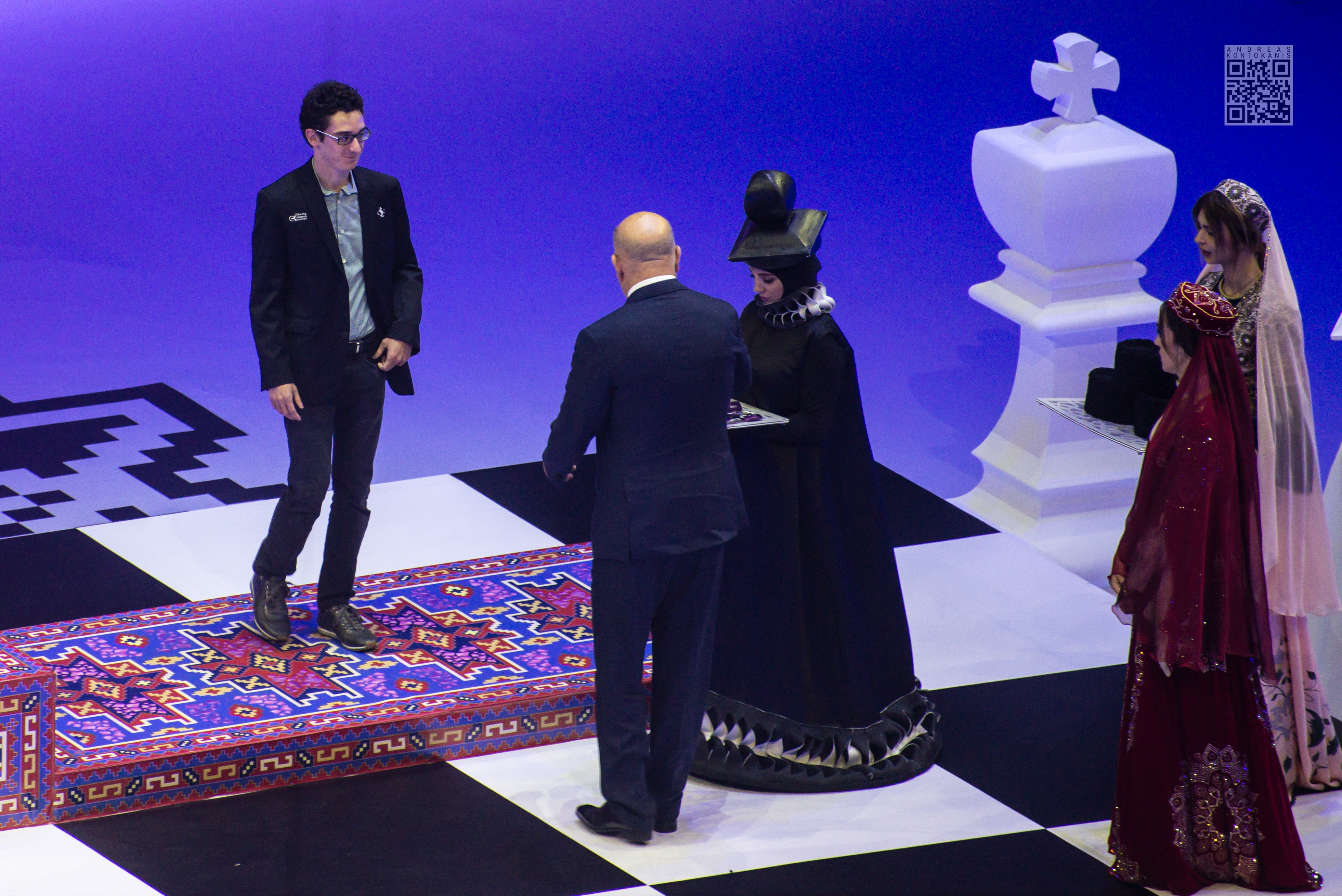 Fabiano Caruana receives his medal